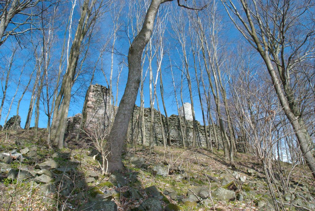 Hrad Kumburk